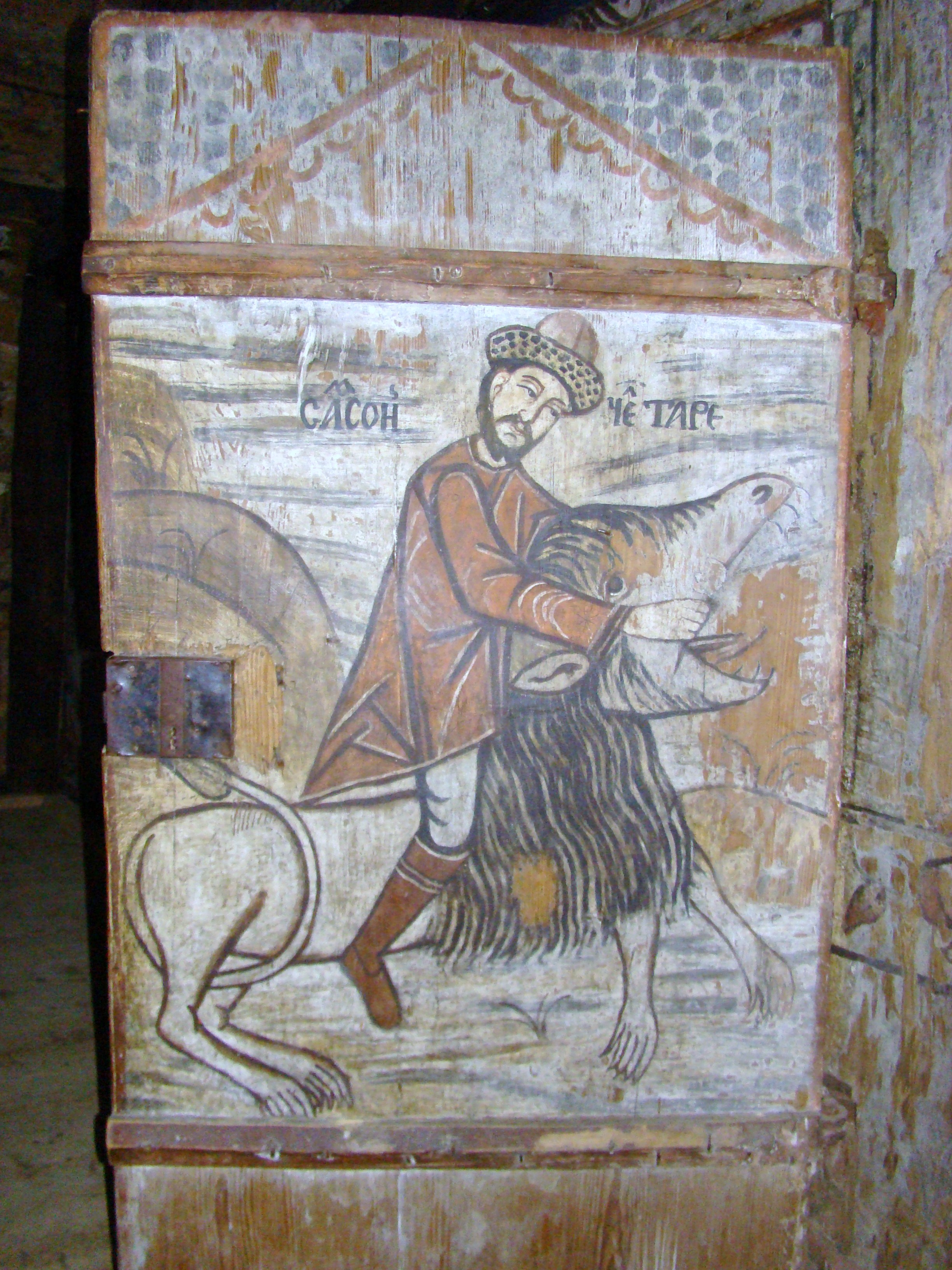 Biserica de lemn "Naşterea Maicii Domnului", sat IEUD